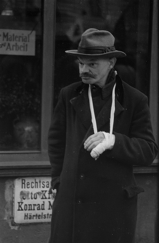 Original image description from the Deutsche Fotothek Portrait eines Mannes mit Handverband